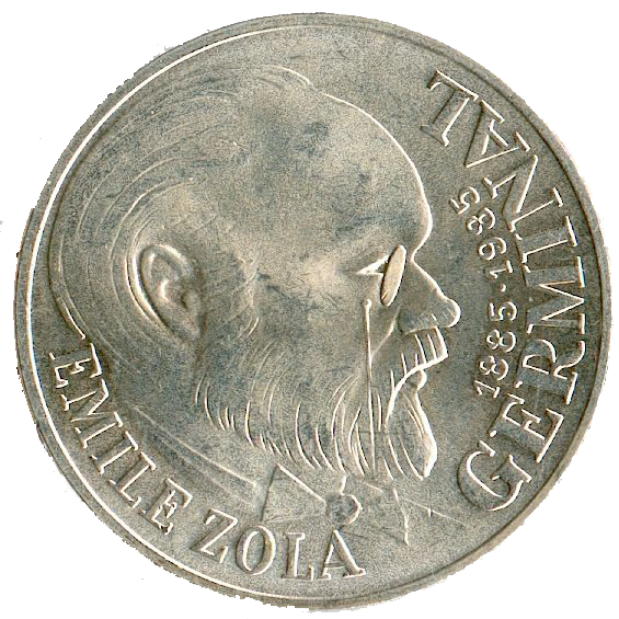 revers de la pièce de 100 francs 1985 (Marie Curie)